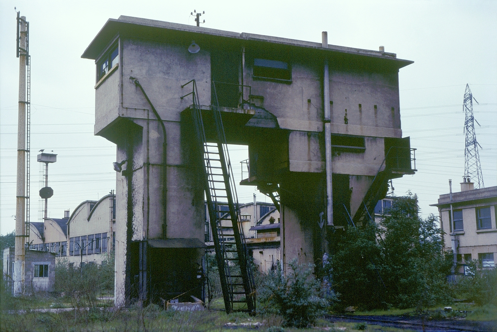 Le toboggan à charbon de l'ancien dépôt vapeur des Joncherolles au mois de mai 1978.